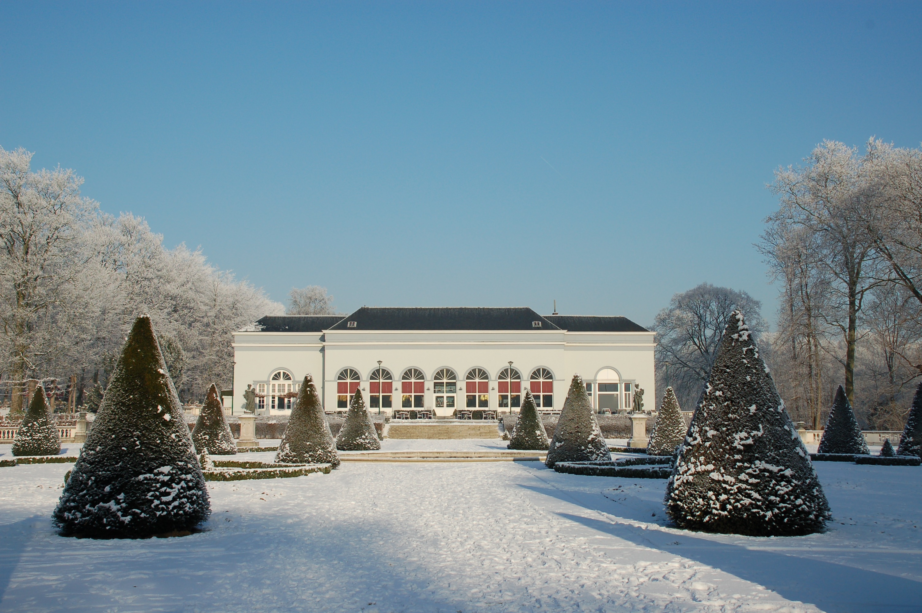 Domein 3 fonteinen, Vlaams Brabant, Vilvoorde